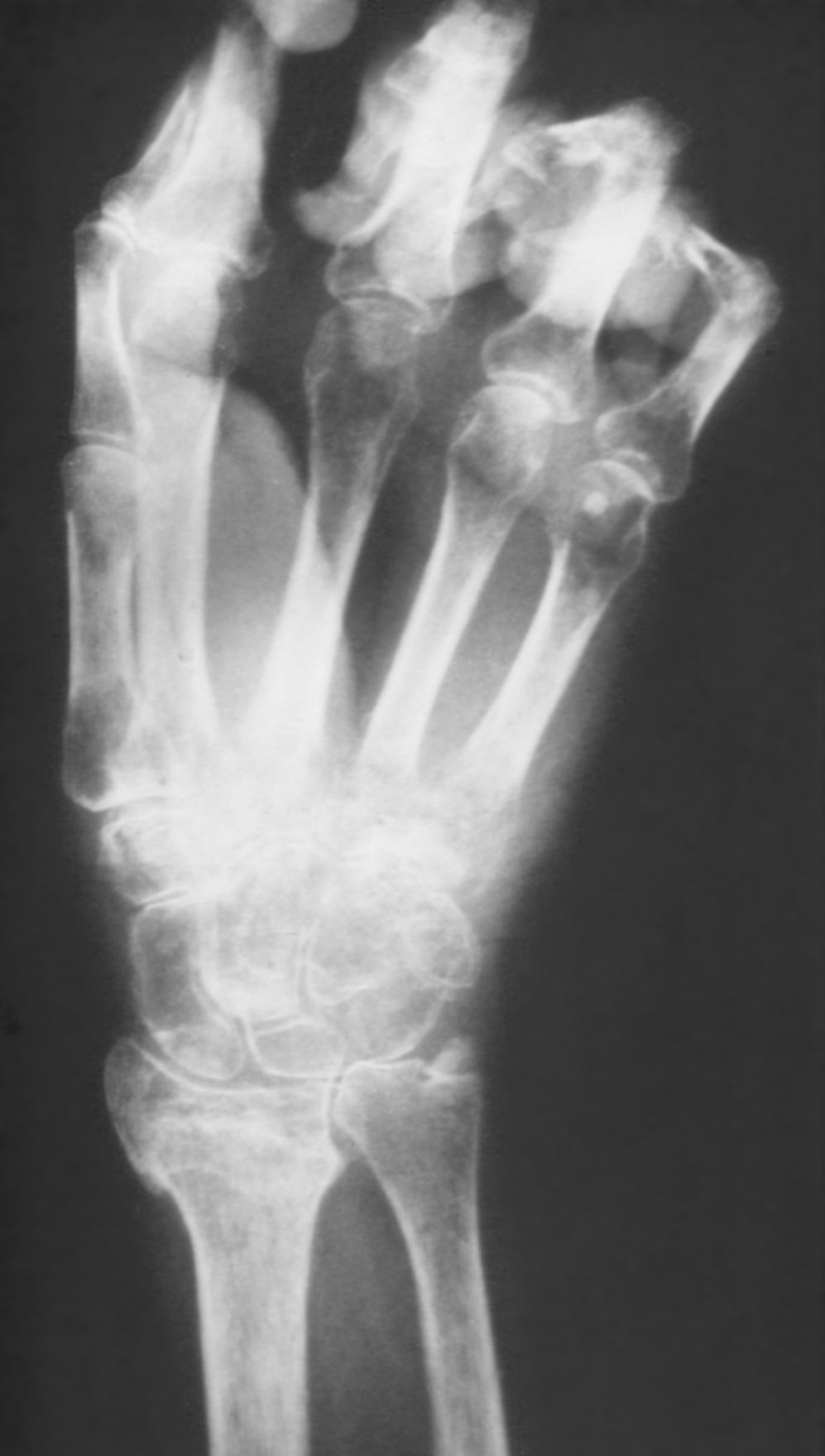 Sudeck-Dystrophie der rechten Hand nach schlecht verheilter distaler Radiusfraktur